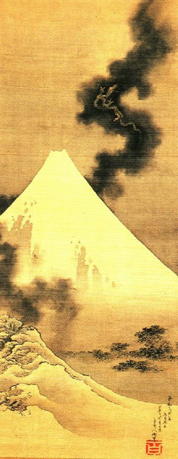 Hokusai